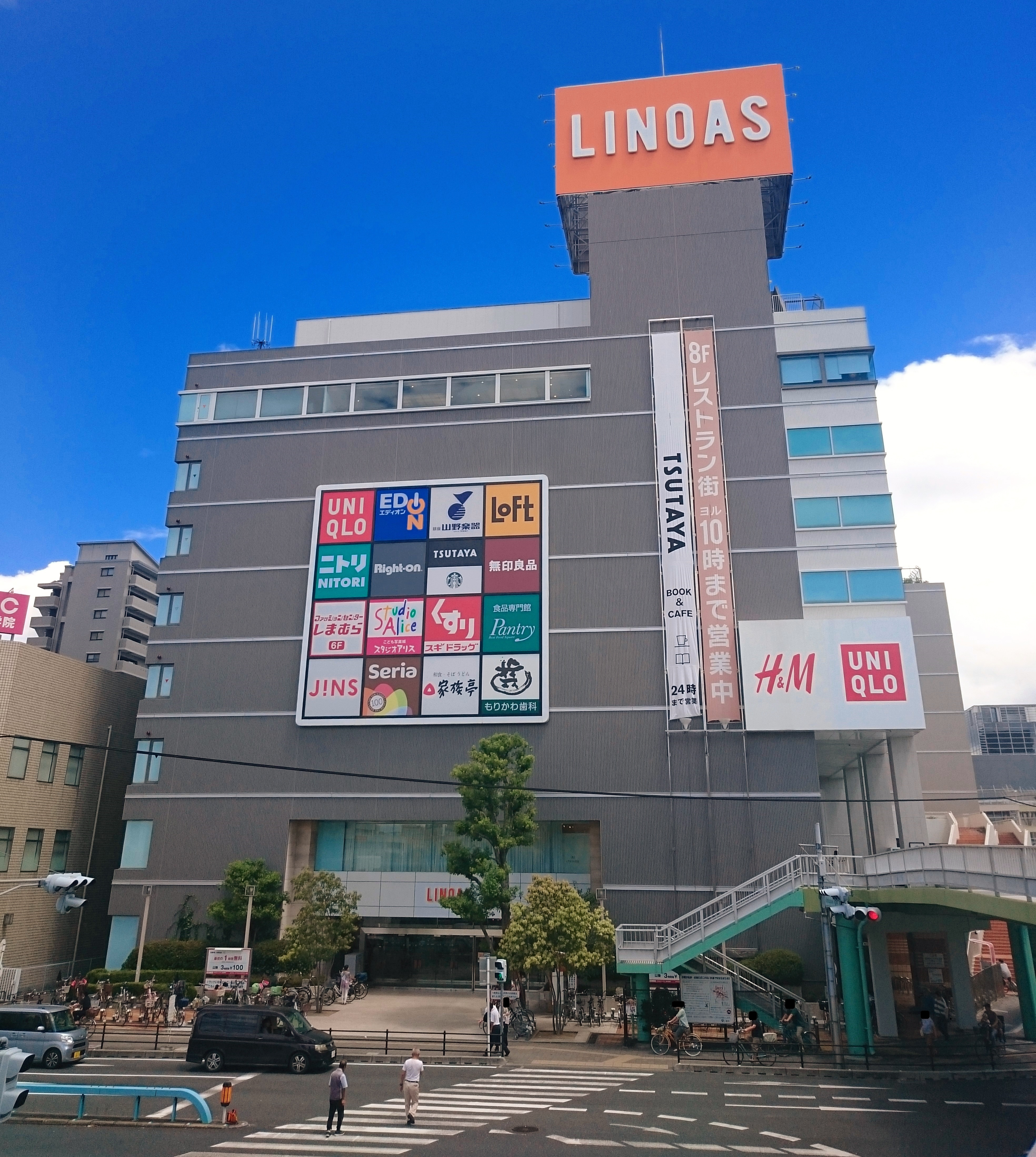 LINOASの外観（外壁改修後） Sony Xperia Z3